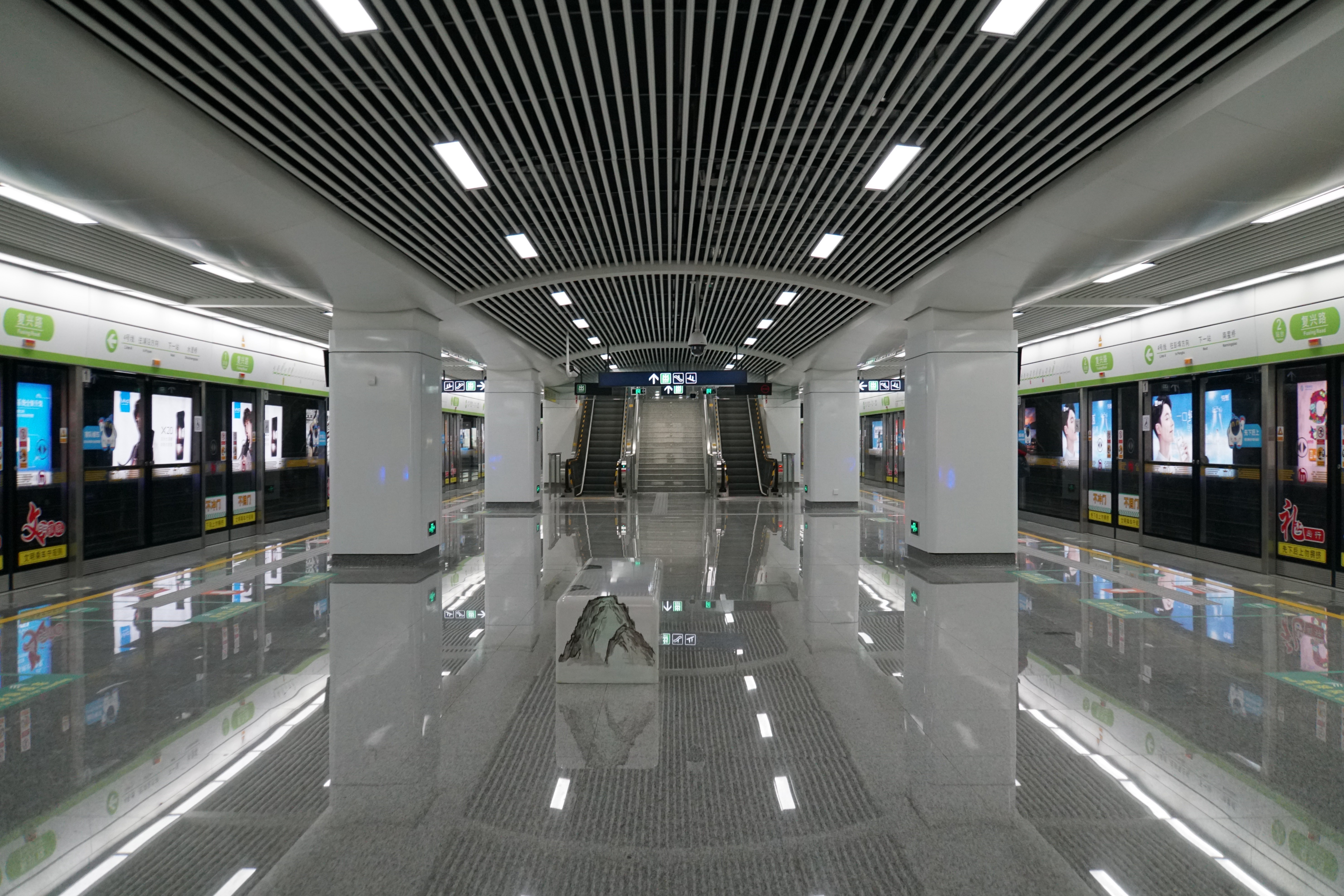 复兴路站站台